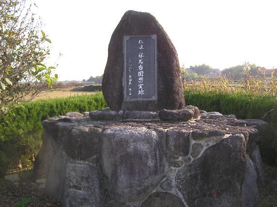 『邪馬台国想定地』の碑